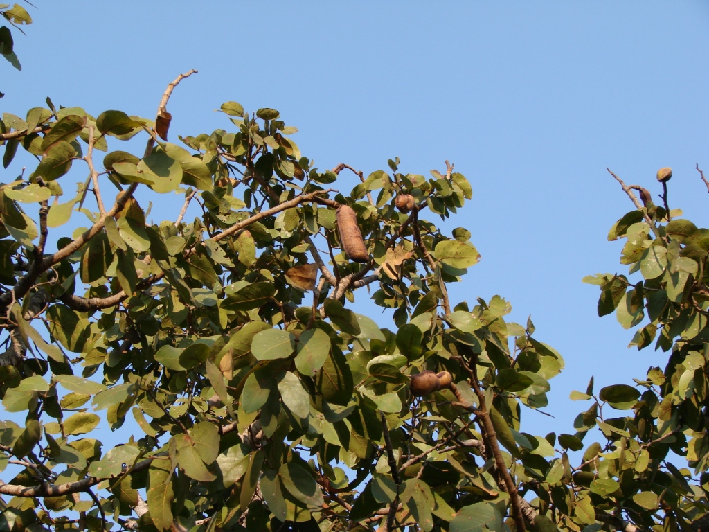 Hymenaea stigonocarpa - FABACEAE Parque Olhos D'Água - Brasília - Distrito Federal - Brasil.